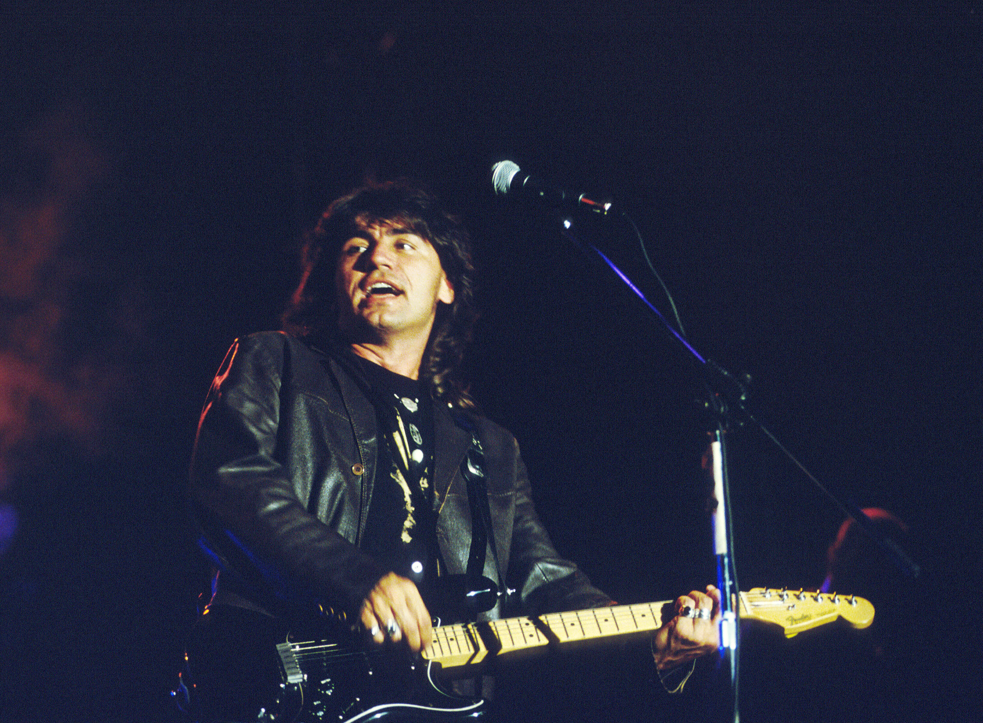 Il cantante, autore e regista Luciano Ligabue